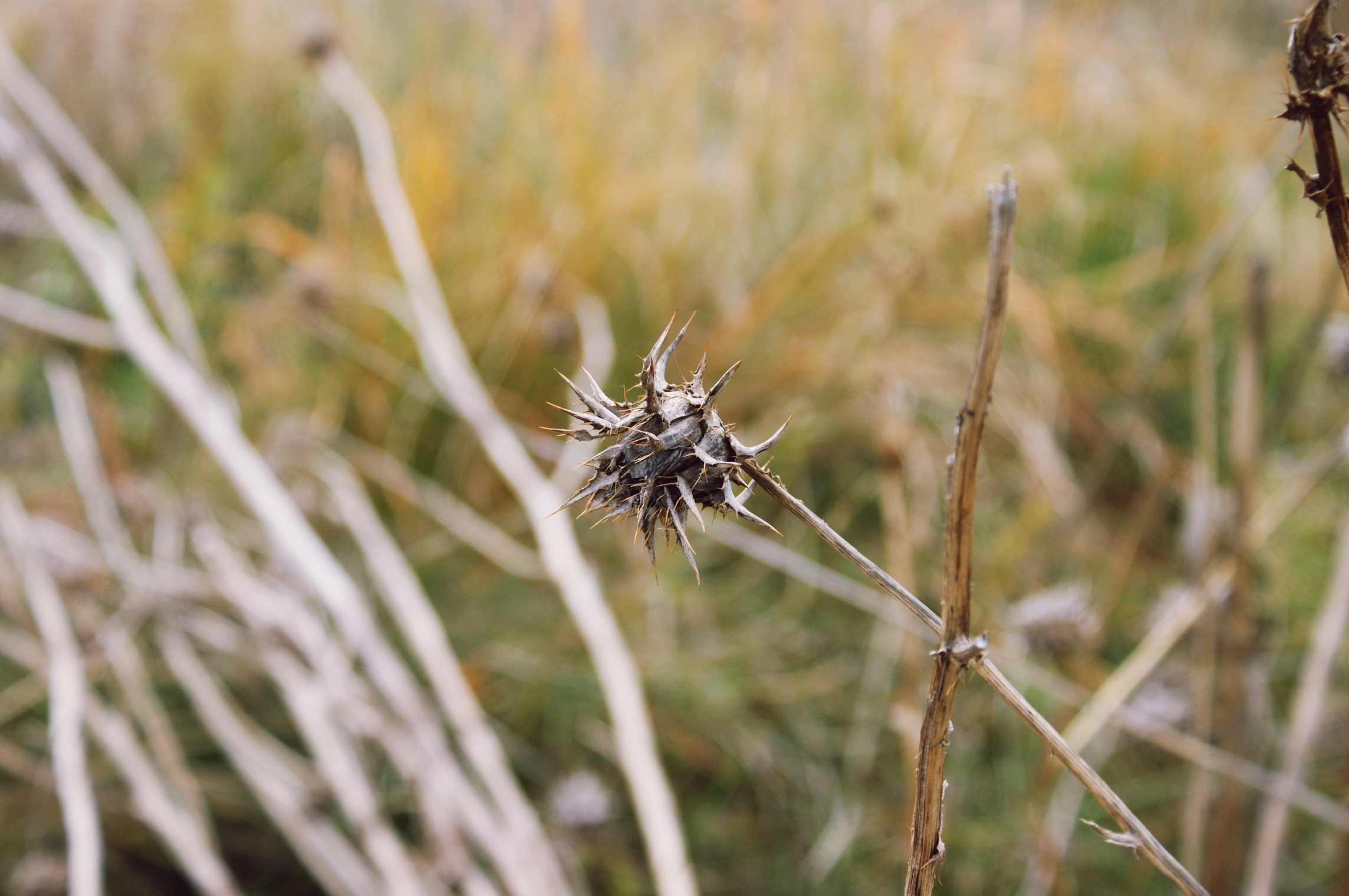 enfoque selectivo del primer plano